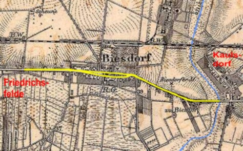 Straße Alt-Biesdorf, Variante 2 (Stand ca. 1895-1900, ganz sicher nicht 1869, siehe Disk)